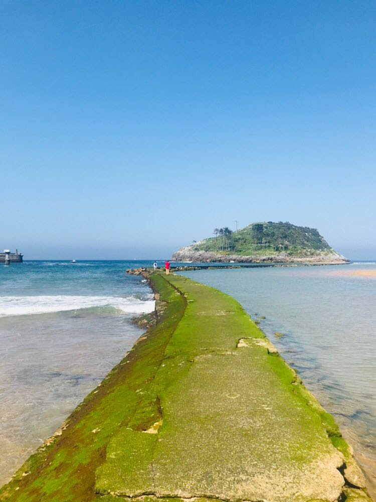 Lazunarri kaia eta Garraitz, Lekeitio (Bizkaia)